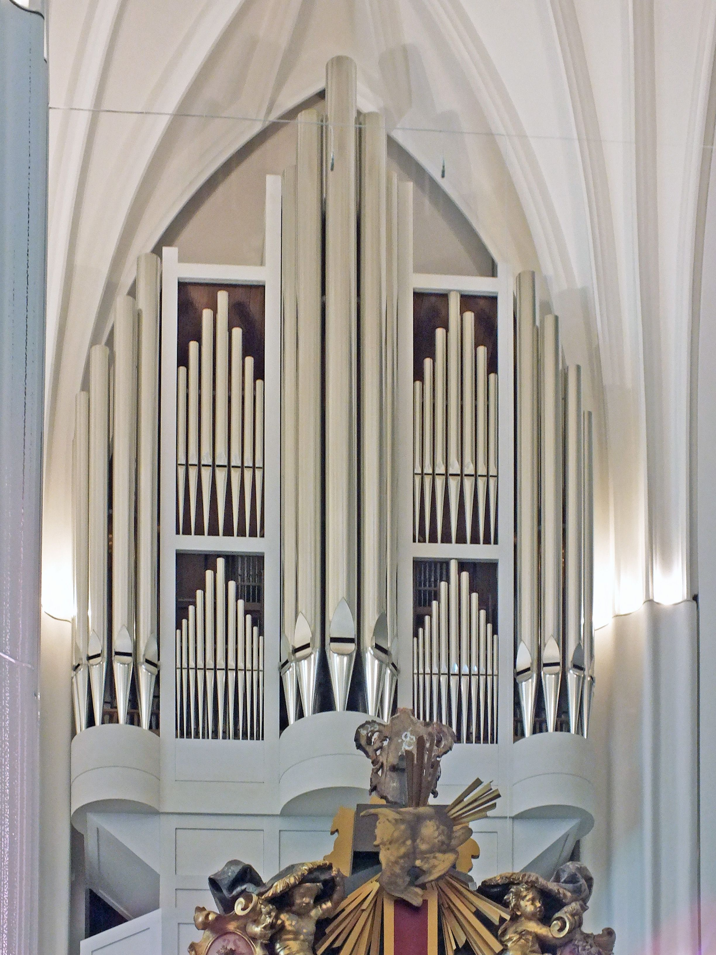 Die Schwalbennestorgel im Andachtsraum des Paulinum - Aula und Universitätsirche St. Pauli der Universität Leipzig